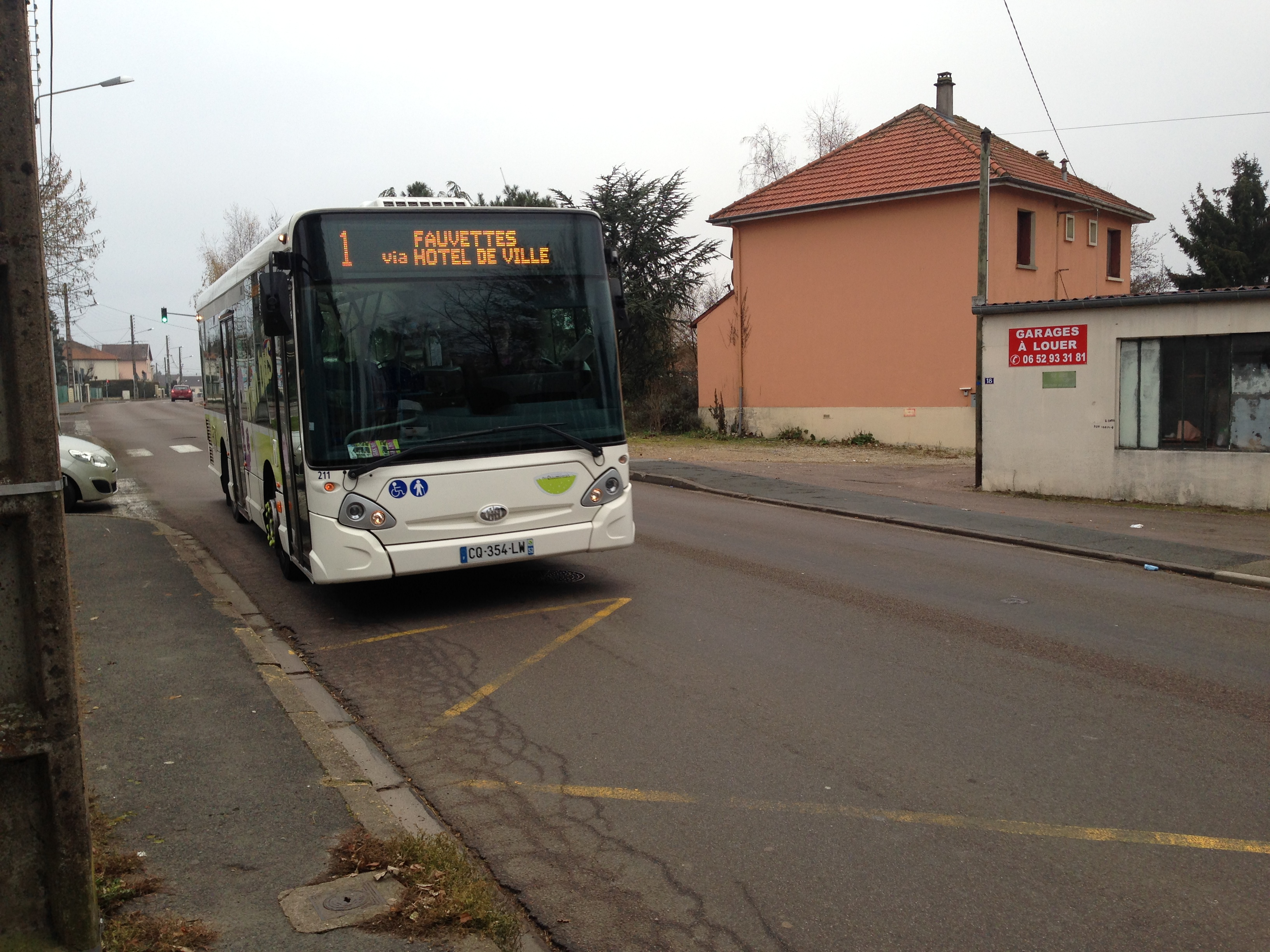 Un Bus à Chaumont